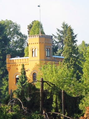 Burg Medinghoven im Bonner Stadtteil Medinghoven